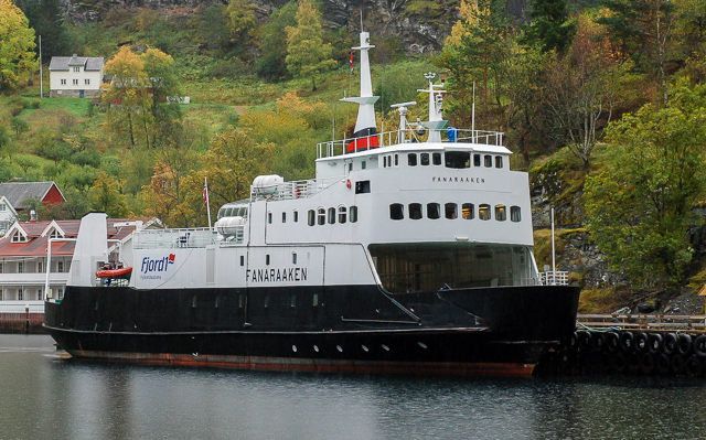 Fanaraaken i Flåm i 2014